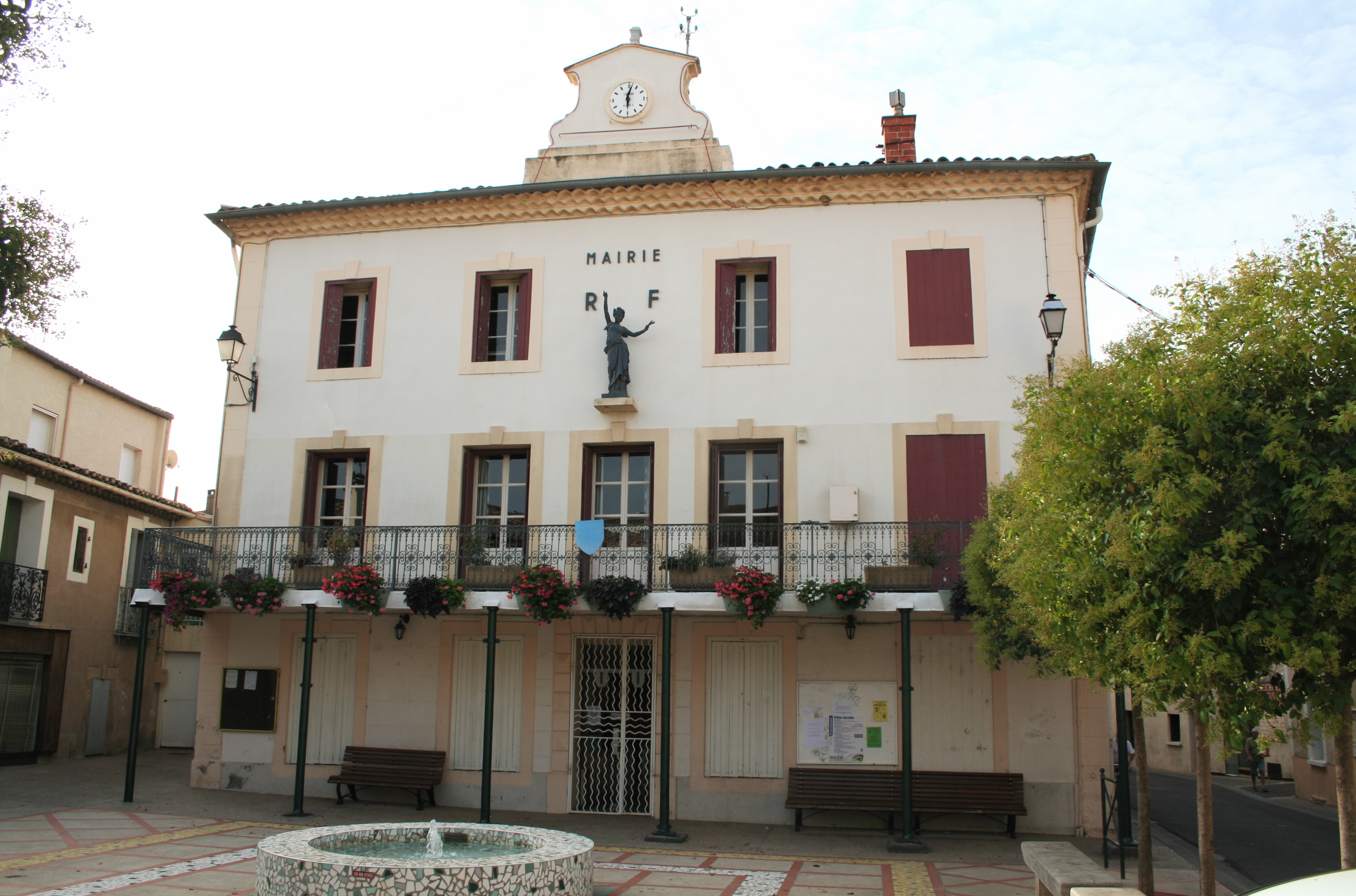 Pinet (Hérault) - mairie.